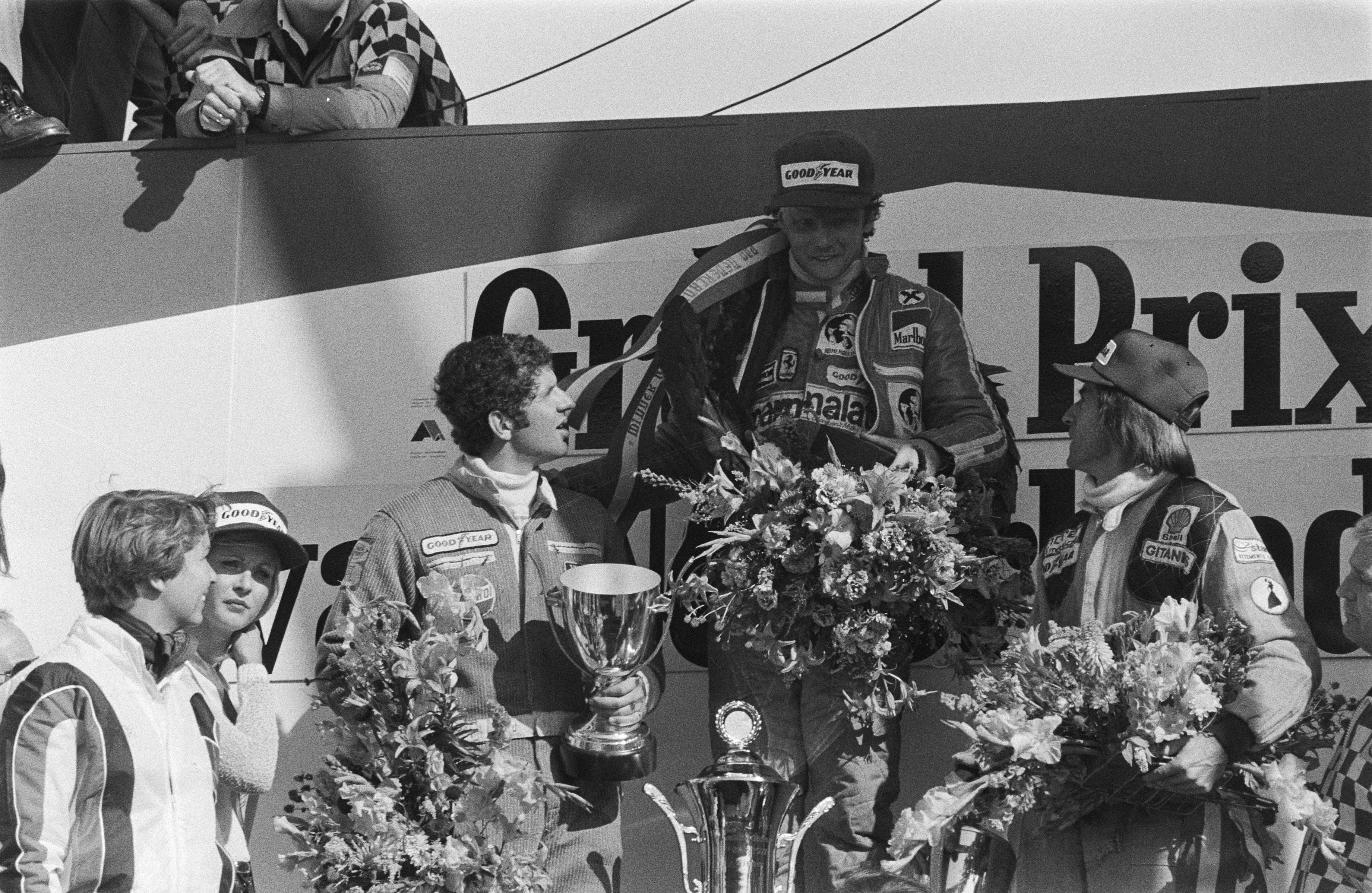 Grand Prix Zandvoort; Niki Lauda tijdens huldiging met Jacques Laffite (2e) en J. Scheckter (3e).